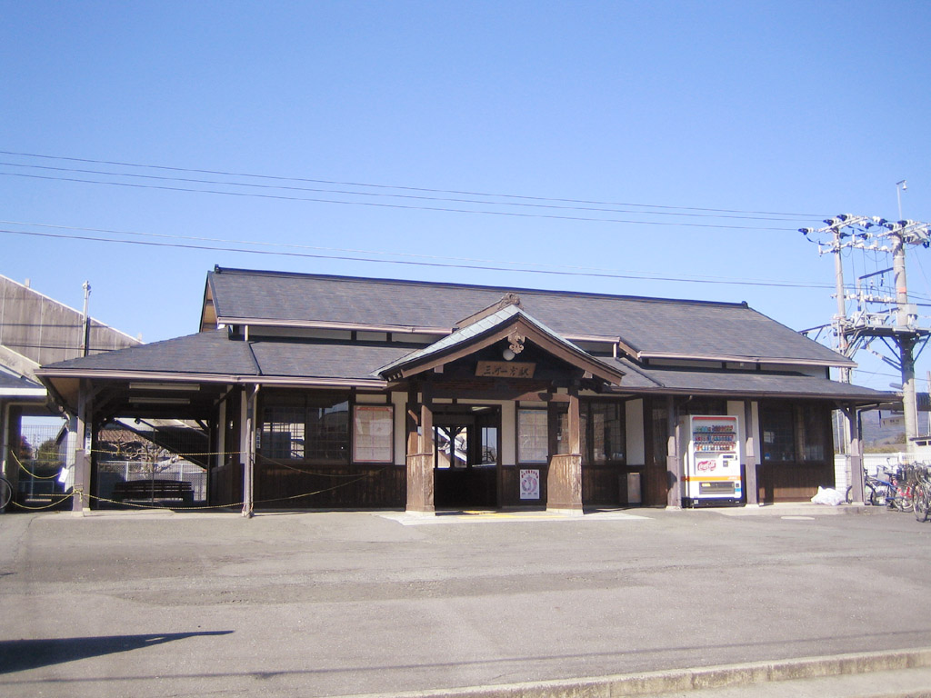 Mikawa-Ichinomiya Station (三河一宮駅), in Aichi, Japan